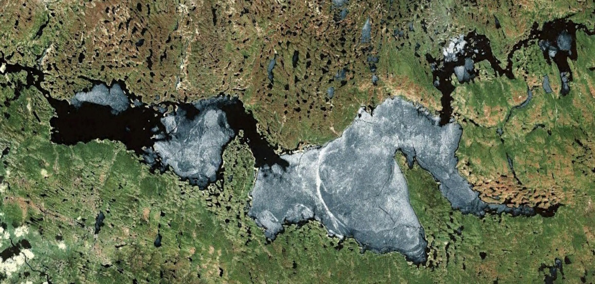 Lac Aberdeen, Nunavut (avec VirtualEarth)